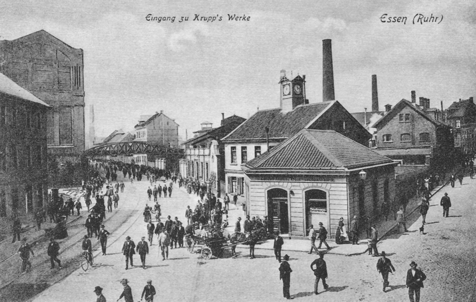 Eingang zur Krupp Gussstahlfabrik in Essen